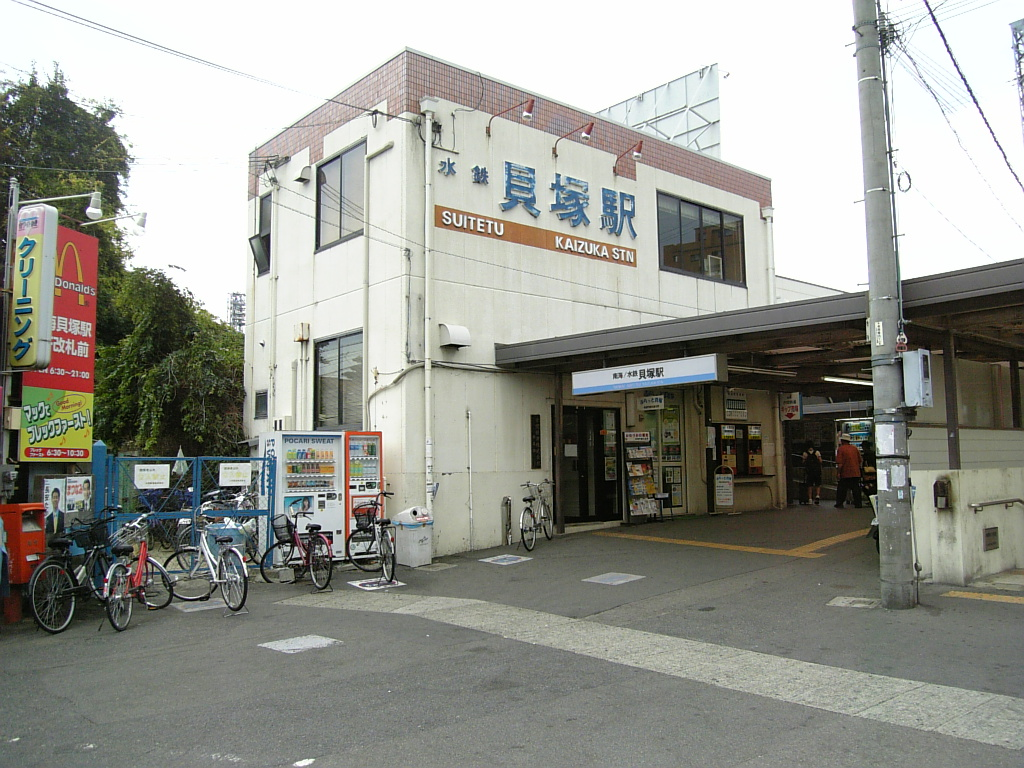 貝塚駅（大阪府貝塚市、水間鉄道側の駅舎）